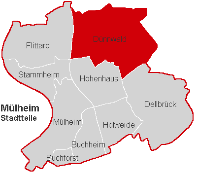 Lagekarte Dünnwald im Stadtbezirk Köln-Mülheim